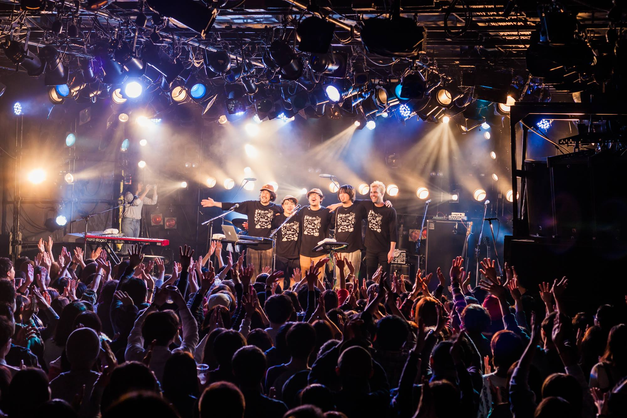 THE CHARM PARK (Presentacion en vivo)